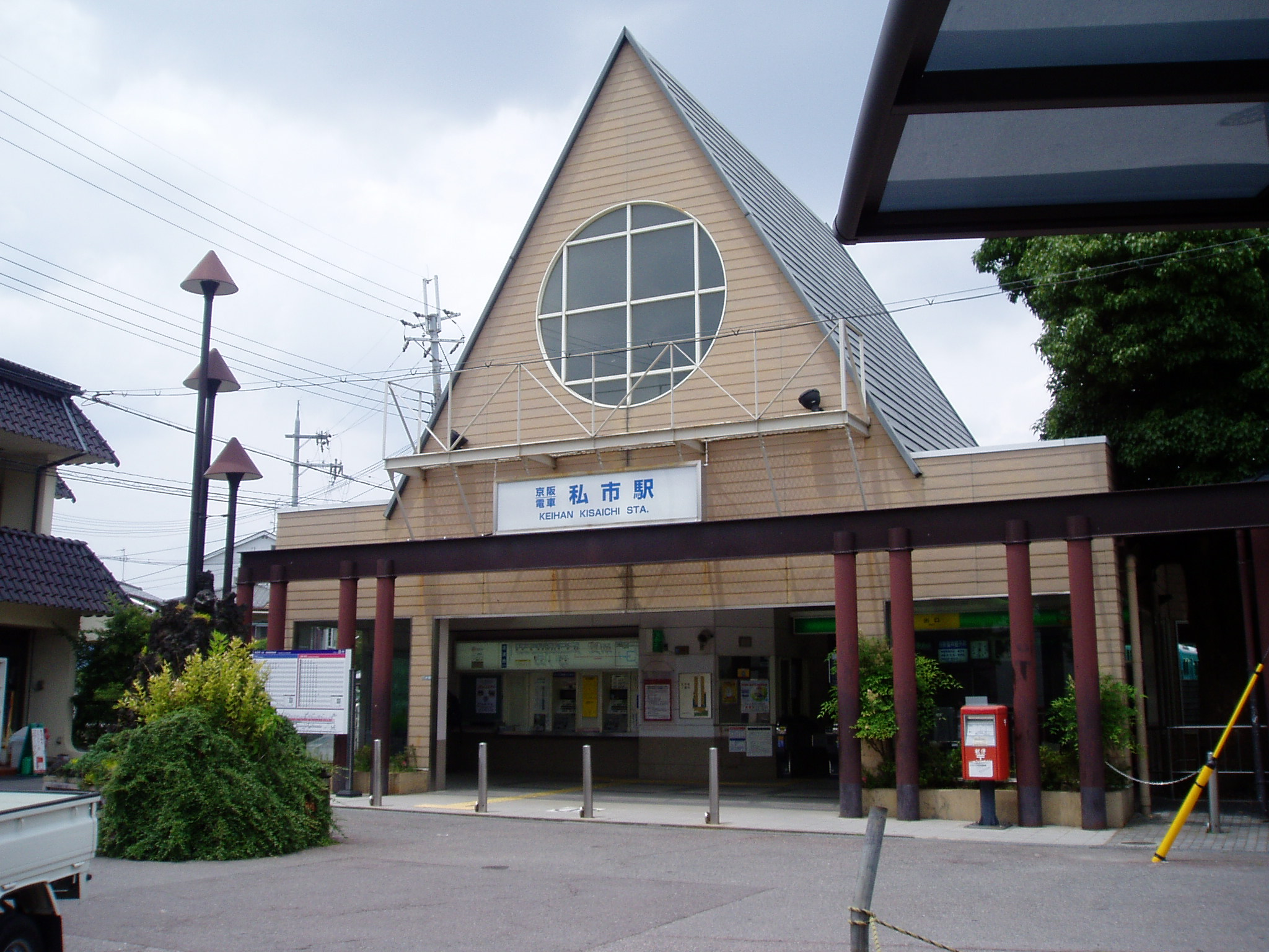 京阪電鉄 私市駅(大阪府交野市) 2007年6月17日撮影 撮影機材:OLYMPUS μ15D 撮影者:Maechan0360